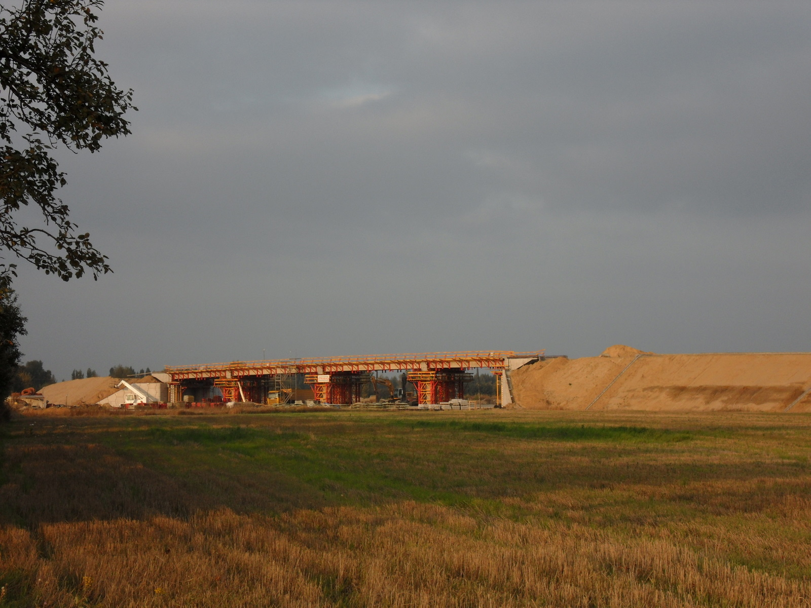 Budowa autostrady A2 w Koszajcu